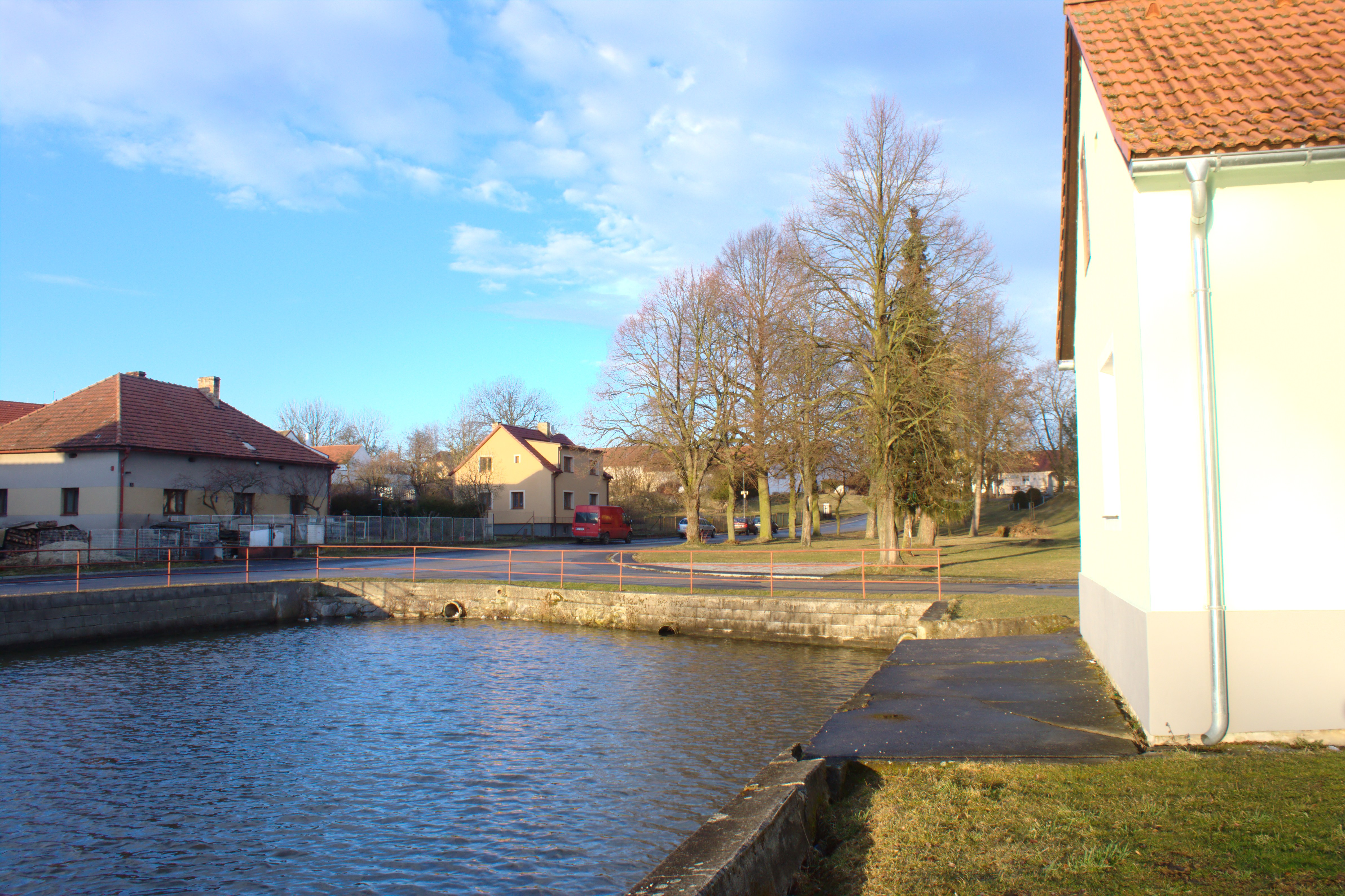 Rybník ve vesnici Mojné Project: Fotíme Česko